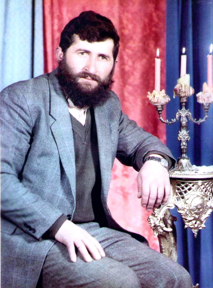 Շահումյանի շրջանի ինքնապաշտպանության կազմակերպիչներից, Շահումյանի շրջանի Էրքեջ գյուղի ինքնապաշտպանական ջոկատիր հրամանատար